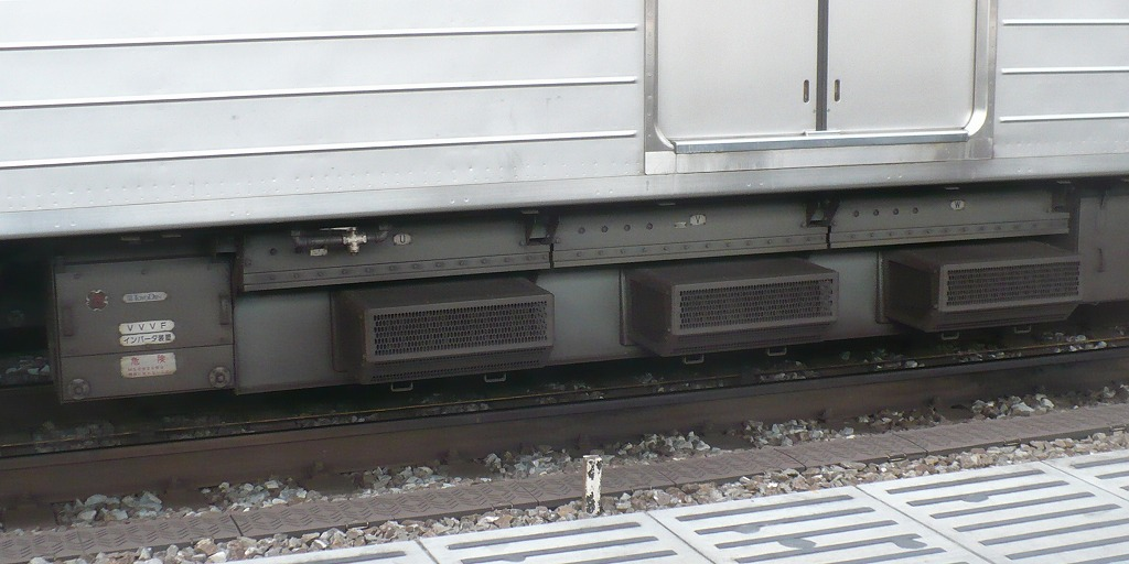 東武9050形のVVVF装置